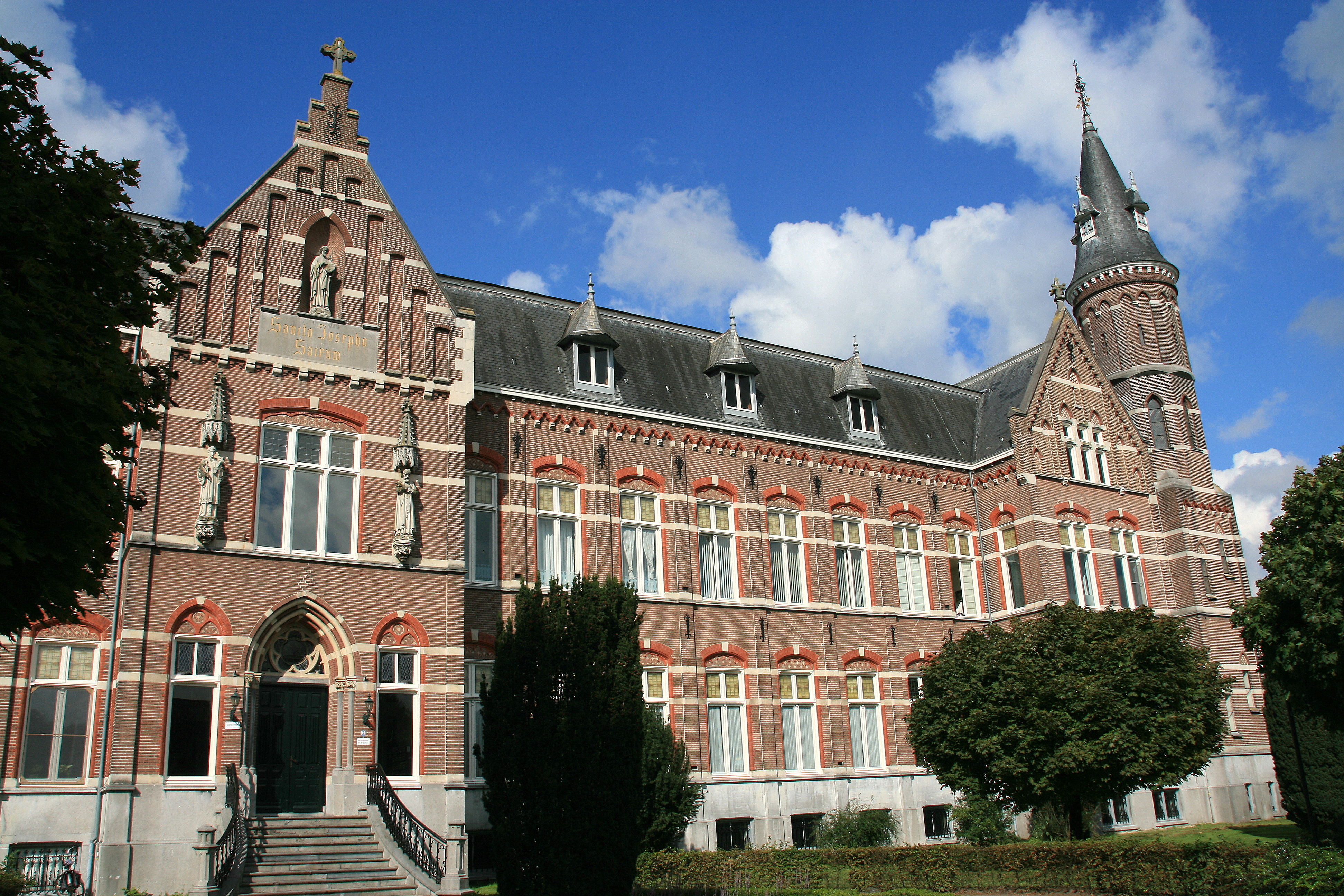 Sint Michielsgestel - Seminarielaan 16 - Seminarie Beekvliet